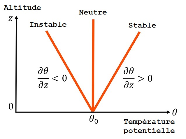 La figure montre la stabilité statique de la température potentielle de l'atmosphère. Lorsque l'atmosphère est stable, θ {\displaystyle \theta } augmente à mesure que l'altitude augmente. Lorsque l'atmosphère est neutre, θ {\displaystyle \theta } est constante quelle que soit l'altitude. Lorsque l'atmosphère est instable, la θ {\displaystyle \theta } diminue avec l'augmentation de l'altitude.